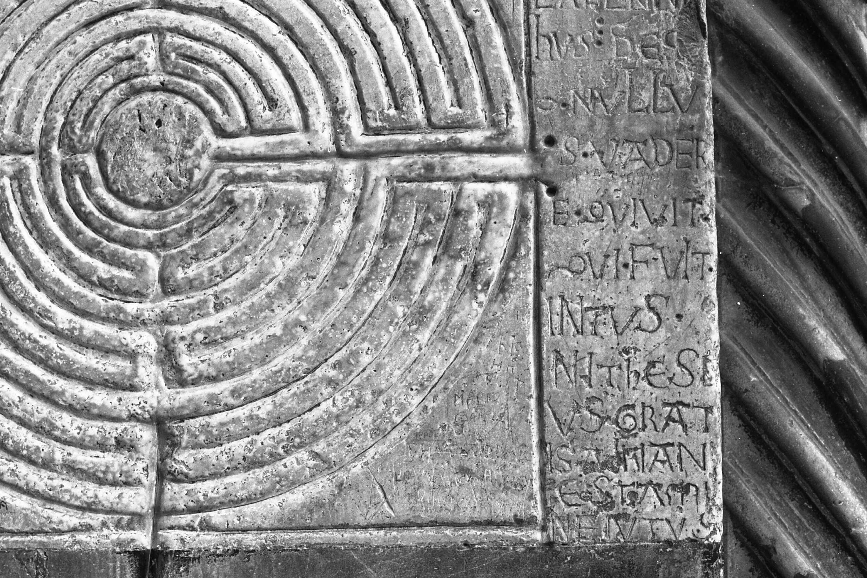 Serie fotografica : Lucca, 1962 / Paolo Monti. - Strisce: 4, Fotogrammi complessivi: 22 : Negativo b/n, gelatina bromuro d'argento/ pellicola ; 35 mm. - ((I fotogrammi hanno una doppia numerazione. - Sul portanegativi: Pentax Agfa 17. - Il labirinto,inciso nel mezzo pilastro aderente al Campanile del Duomo, reca scritto:"Hic quem creticus edit dedalis est laberint hus ded(U)-Onullus-s vader- e quivit qui fuit intus ni these-us grat-is adrian-e stami-ne iutus": "Questo e' il labirinto costruito da Dedalo di creta dal quale nessuno entratovi pote' uscire salvo Teseo grazie al filo di Arianna". - Fonte: Agenda di Paolo Monti: Foto Leica 1 / 1-51 verde, 1-110 nera (1958-1963), presso Archivio Paolo Monti